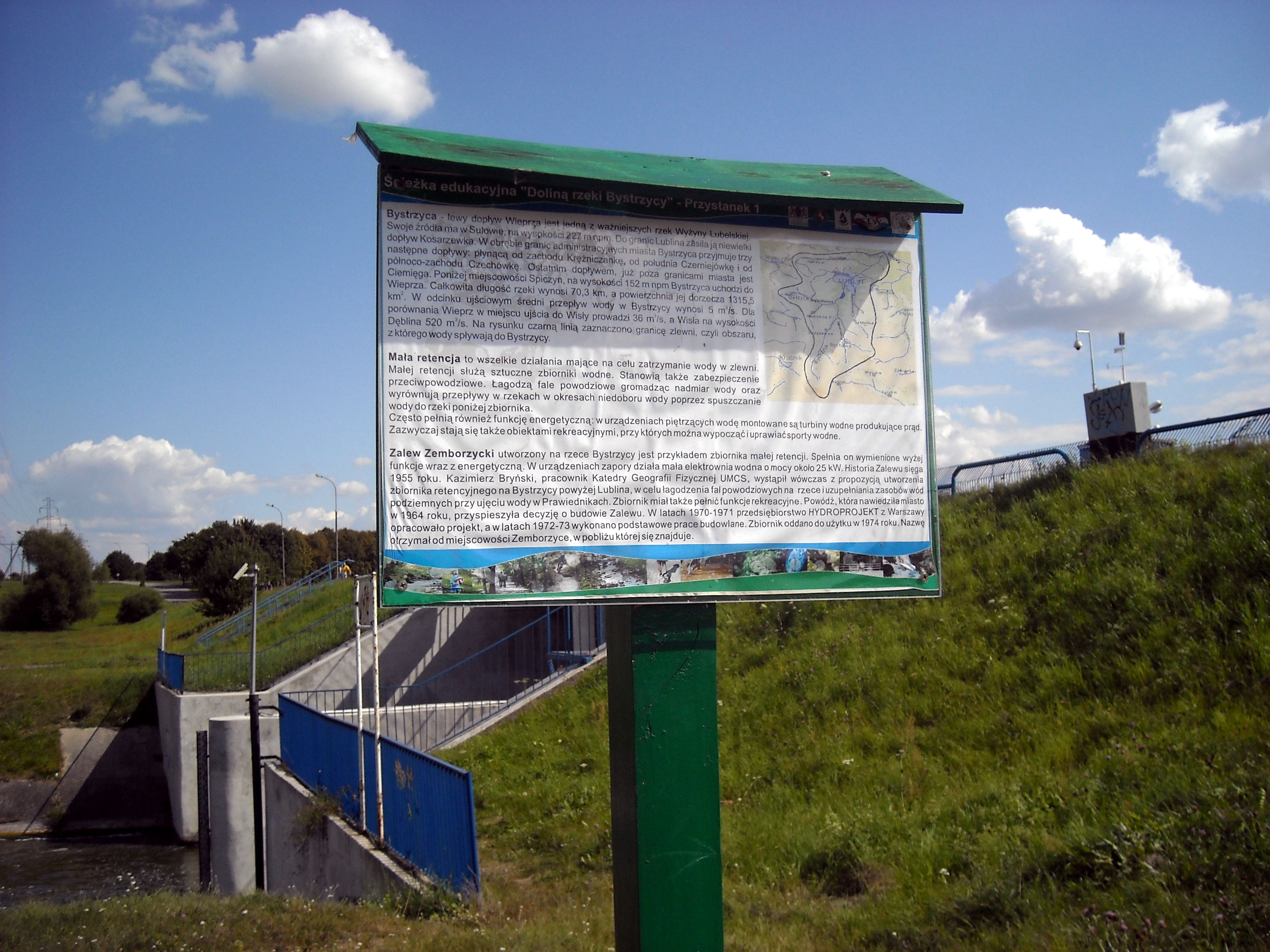 Tablica informacyjna o szlaku edukacyjno-turystycznym "Doliną rzeki Bystrzycy" - nieopodal zapory, ścieżki rowerowej i ul. Żeglarskiej w lubelskiej dzielnicy Wrotków.